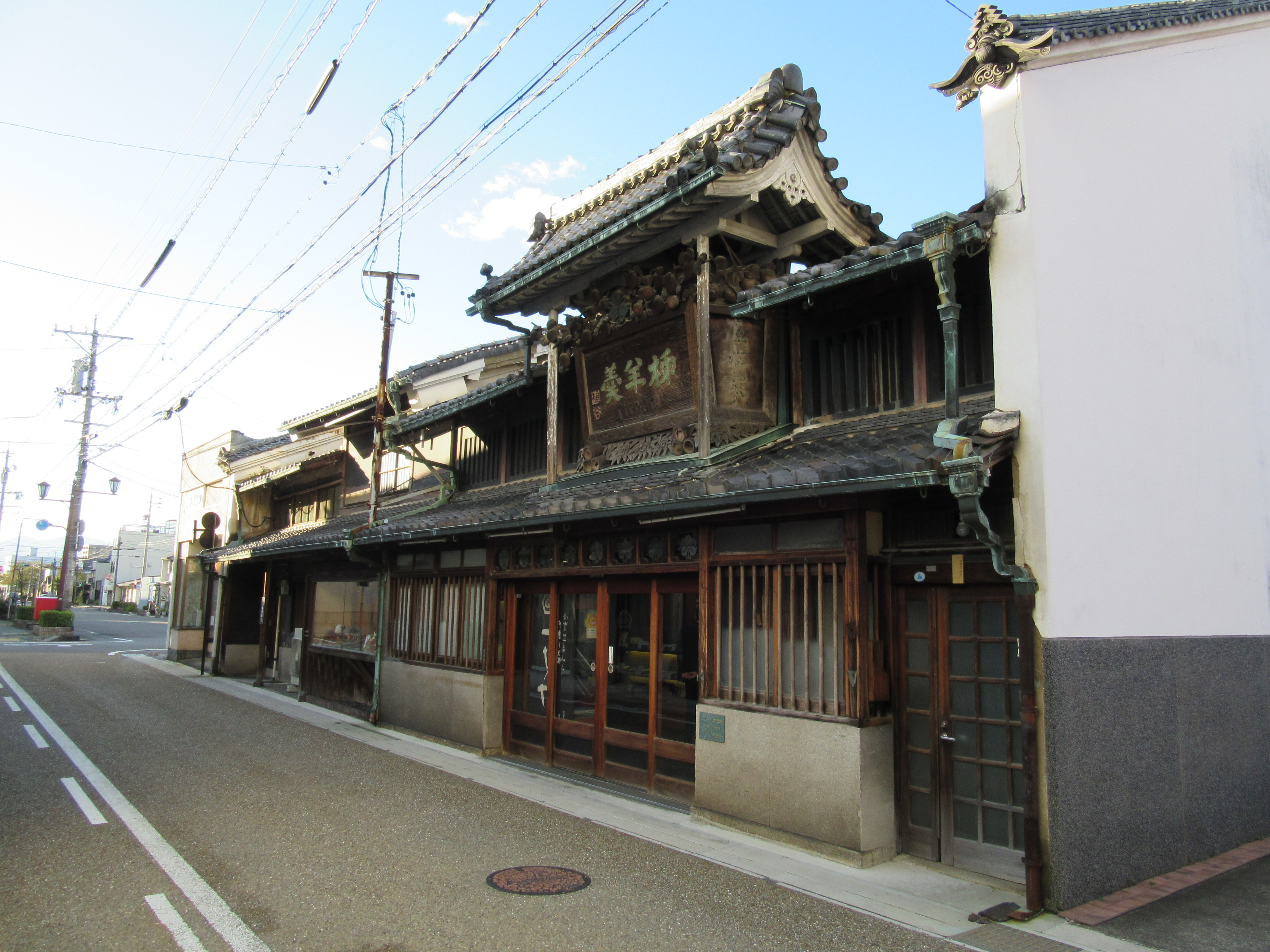 槌谷本店（大垣市）